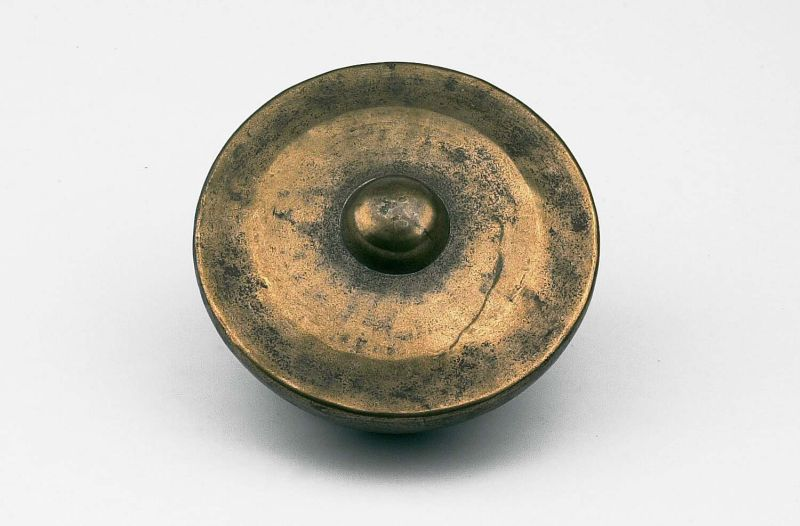 Slaginstrument. Gong van messing Unknown language: Bonang